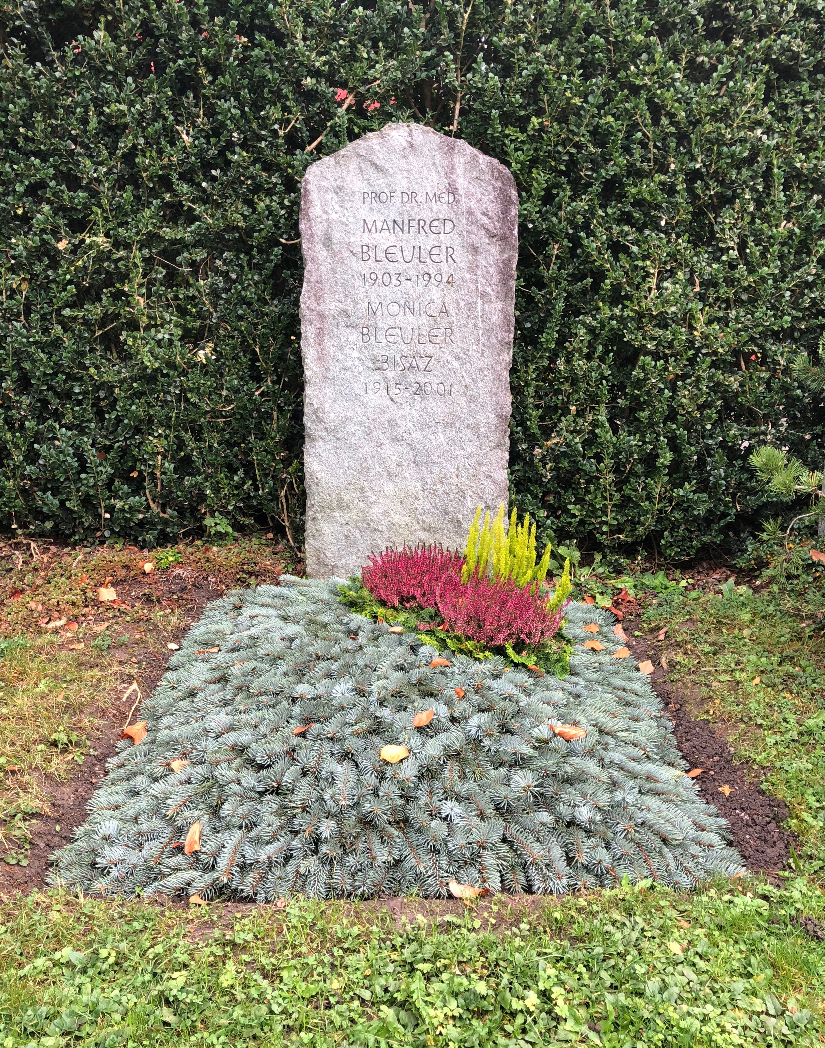 Grabstein von Manfred Bleuler auf dem Zolliker Friedhof